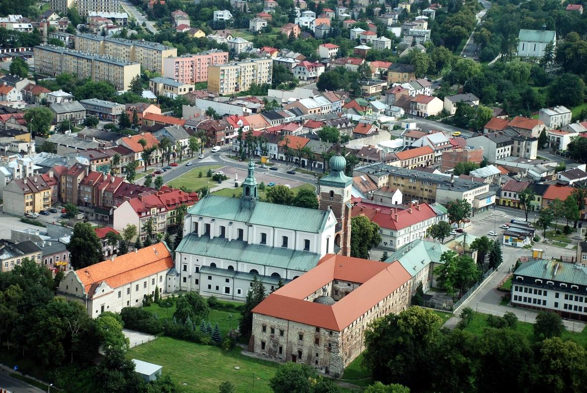 Miechów z lotu ptaka